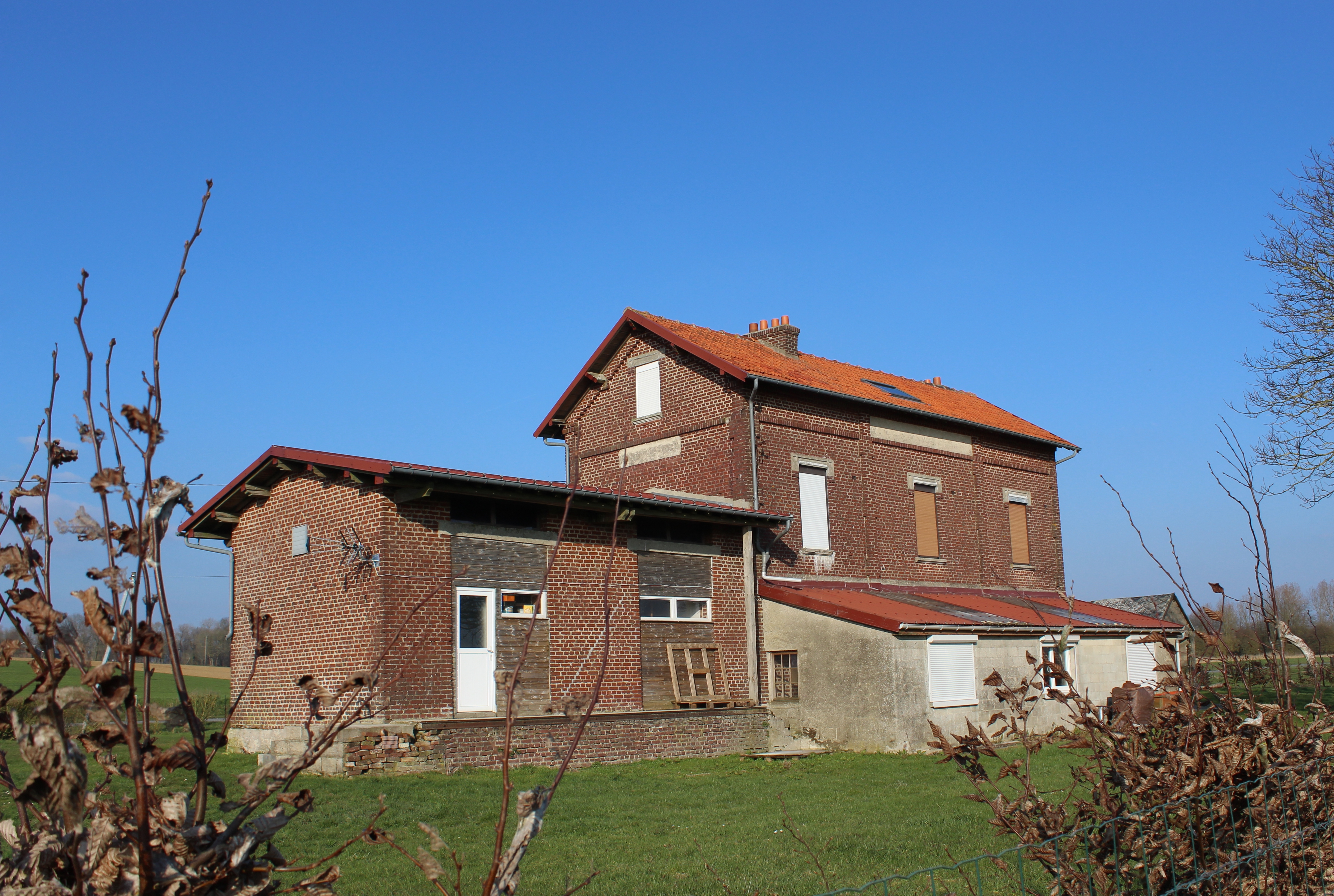 L'ancienne gare de la ligne Saint-Quentin-Vélu-Bertincourt.